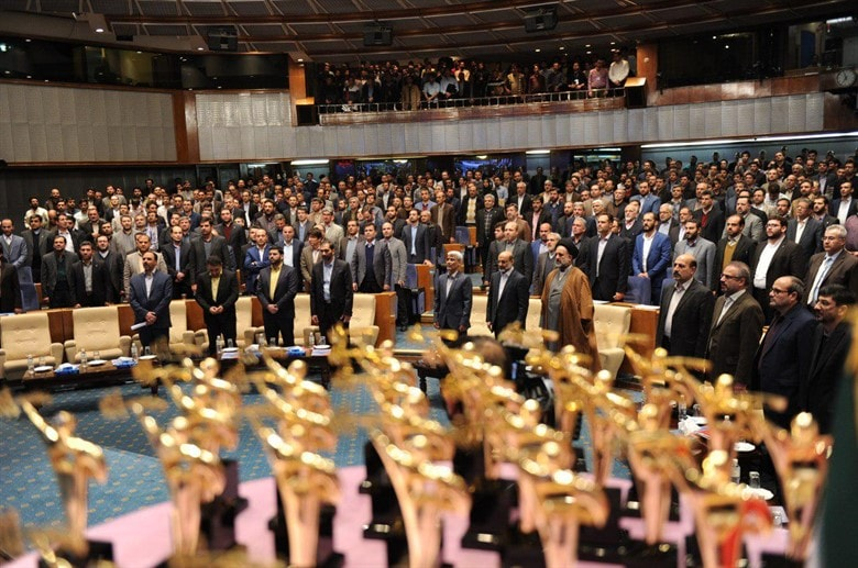 درخشش فارغ التحصیلان ارشد مهندسی دانشگاه صدا و سیما در همایش بین المللی فناوری رسانه ابتکارات و توانمندی های مهندسین کارشناسی ارشد فارغ التحصیل دانشگاه صدا و سیما